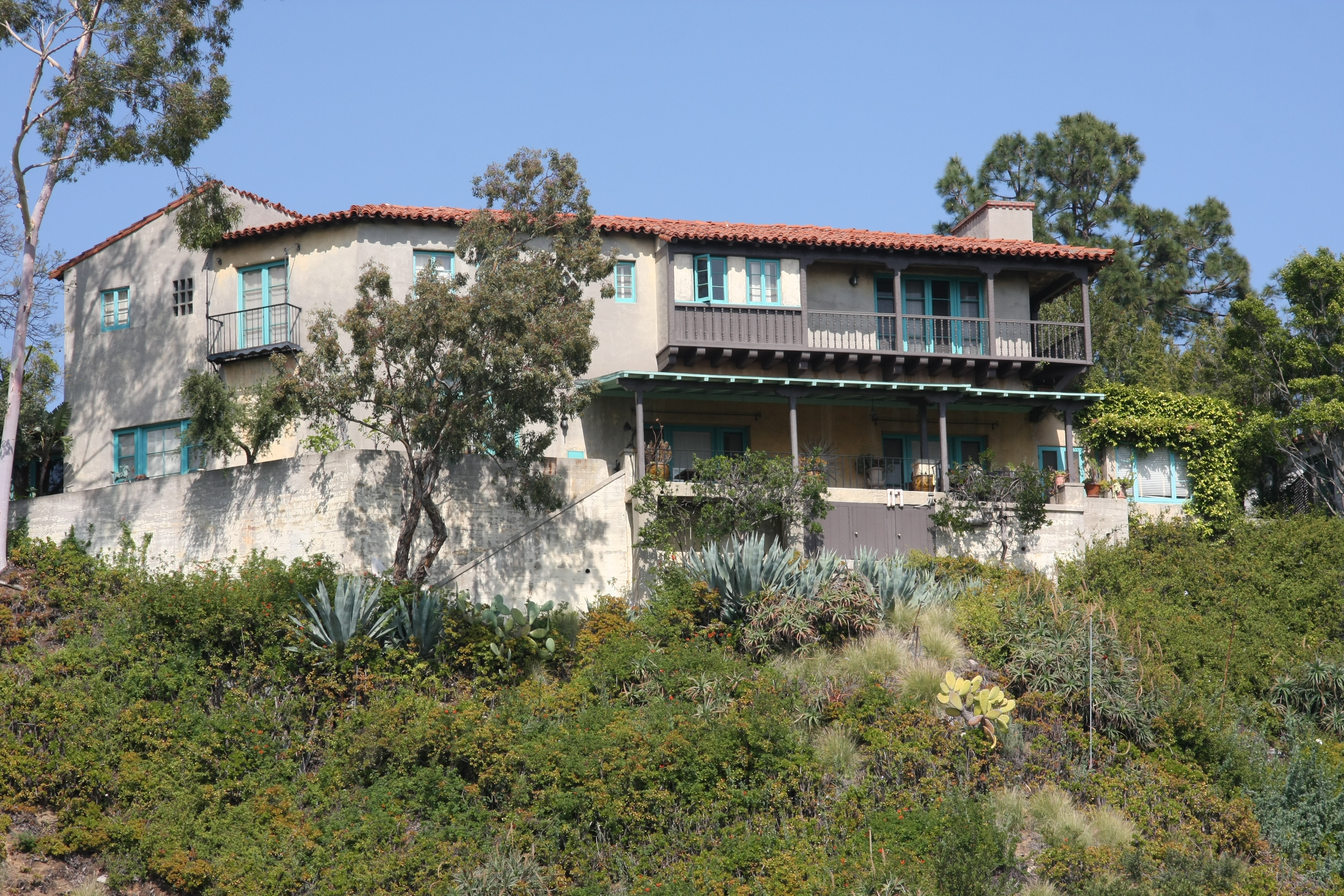 Das Anwesen Madonnas in den Hollywood Hills, Los Angeles im Jahr 2012.